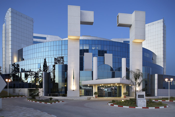 Ministère des finances - Alger - Algérie